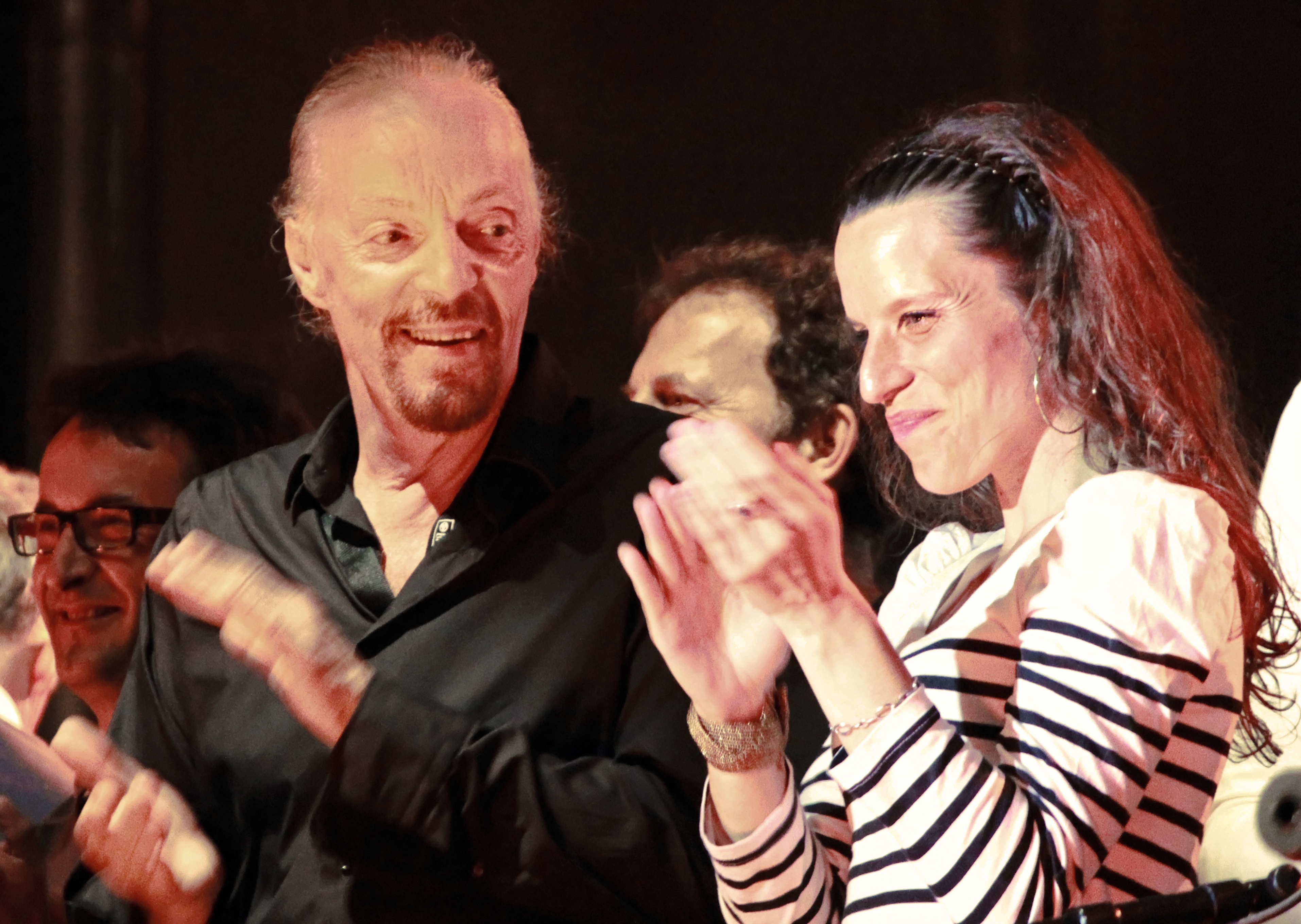 Clarisse Lavanant et Alan Stivell lors du concert inaugural de la tournée liée à la promotion de l'album Celebration, lors du Festival Interceltique de Lorient 2012.